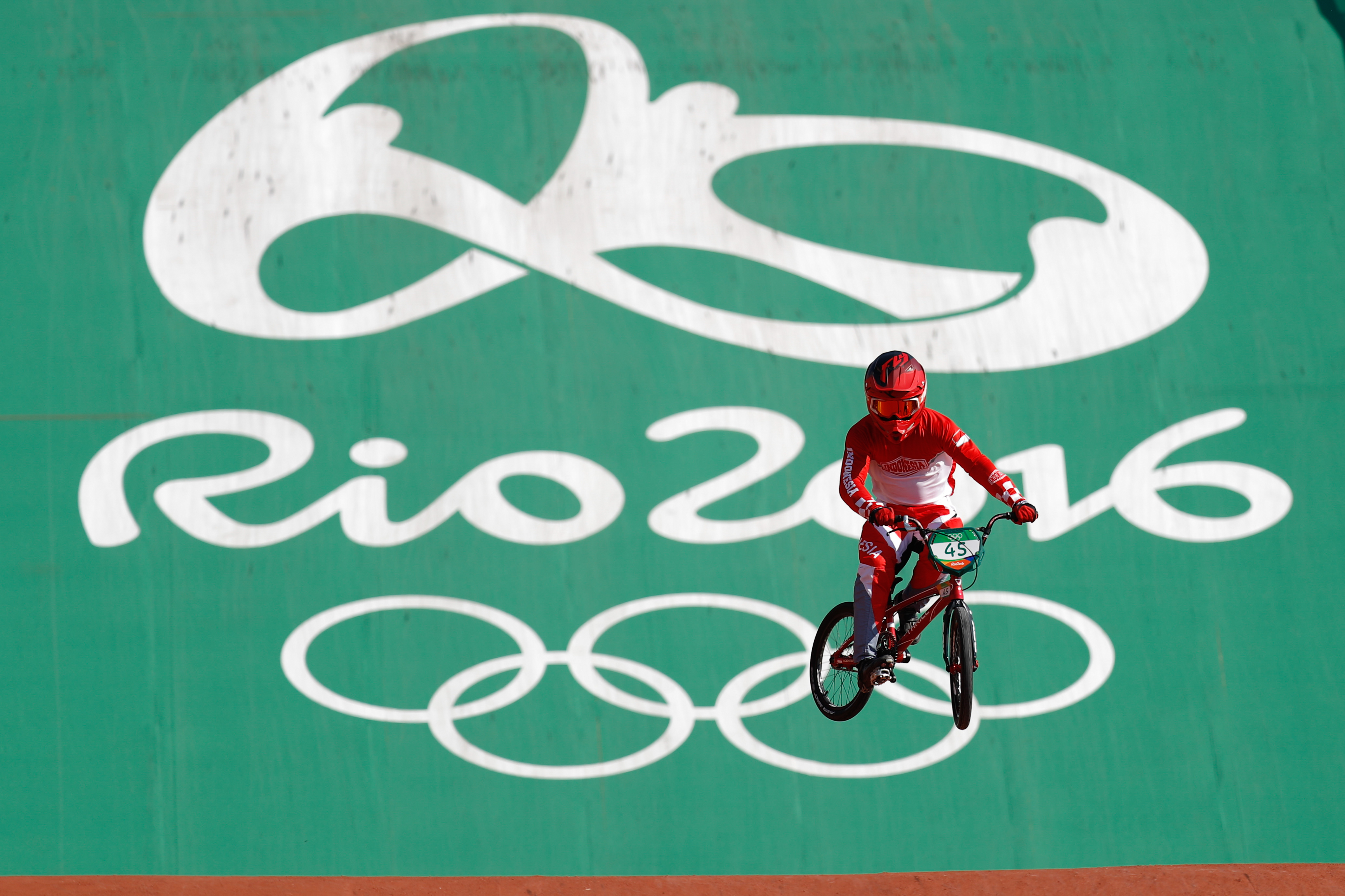 Rio de Janeiro - Ciclista indonésio Toni Syarifudin compete BMX nos Jogos Olímpicos Rio 2016, no Parque Radical em Deodoro (Fernando Frazão/Agência Brasil)